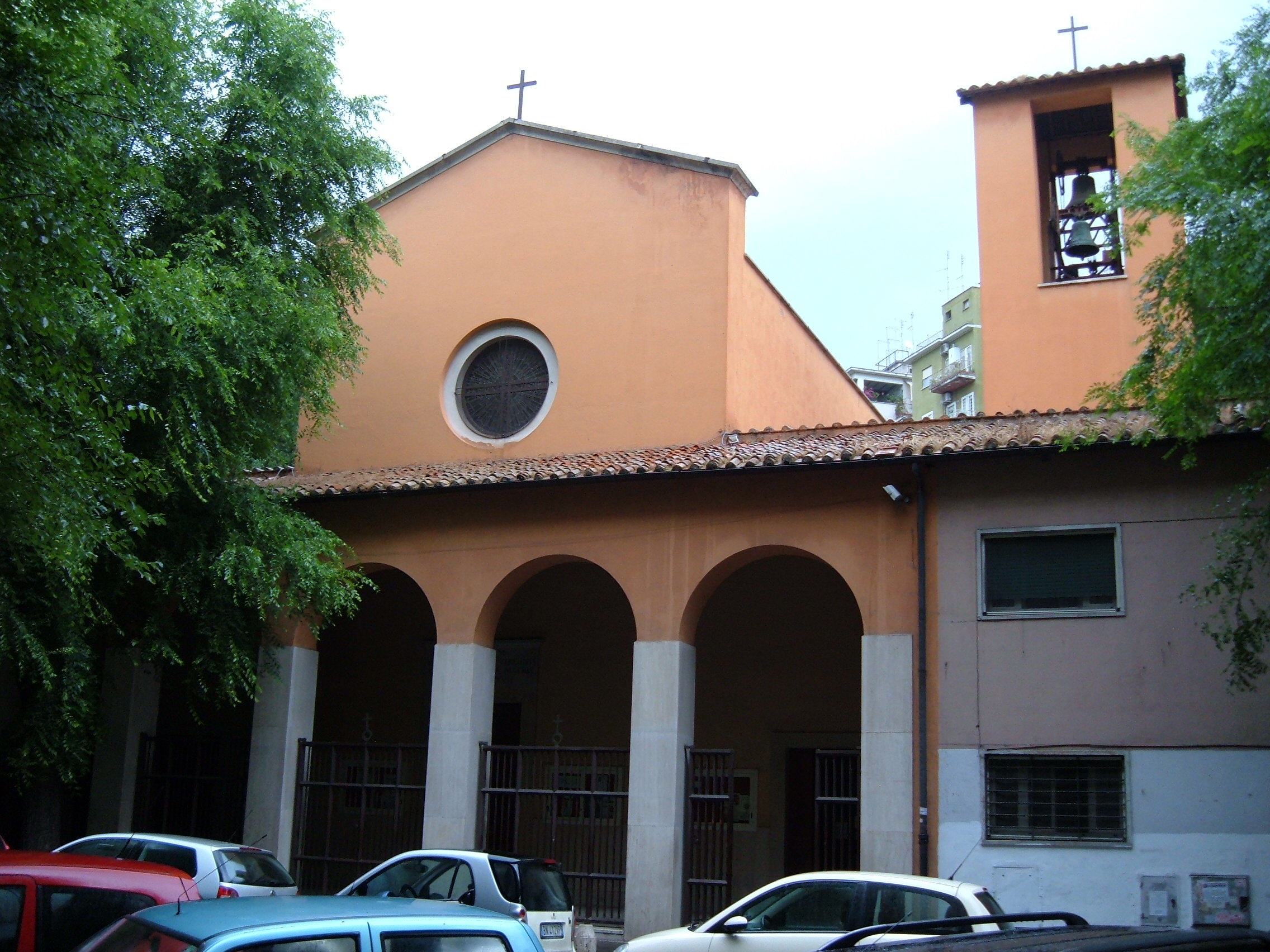 Chiesa di Santa Maria Madre della Provvidenza, a Roma, nel quartiere Gianicolense.